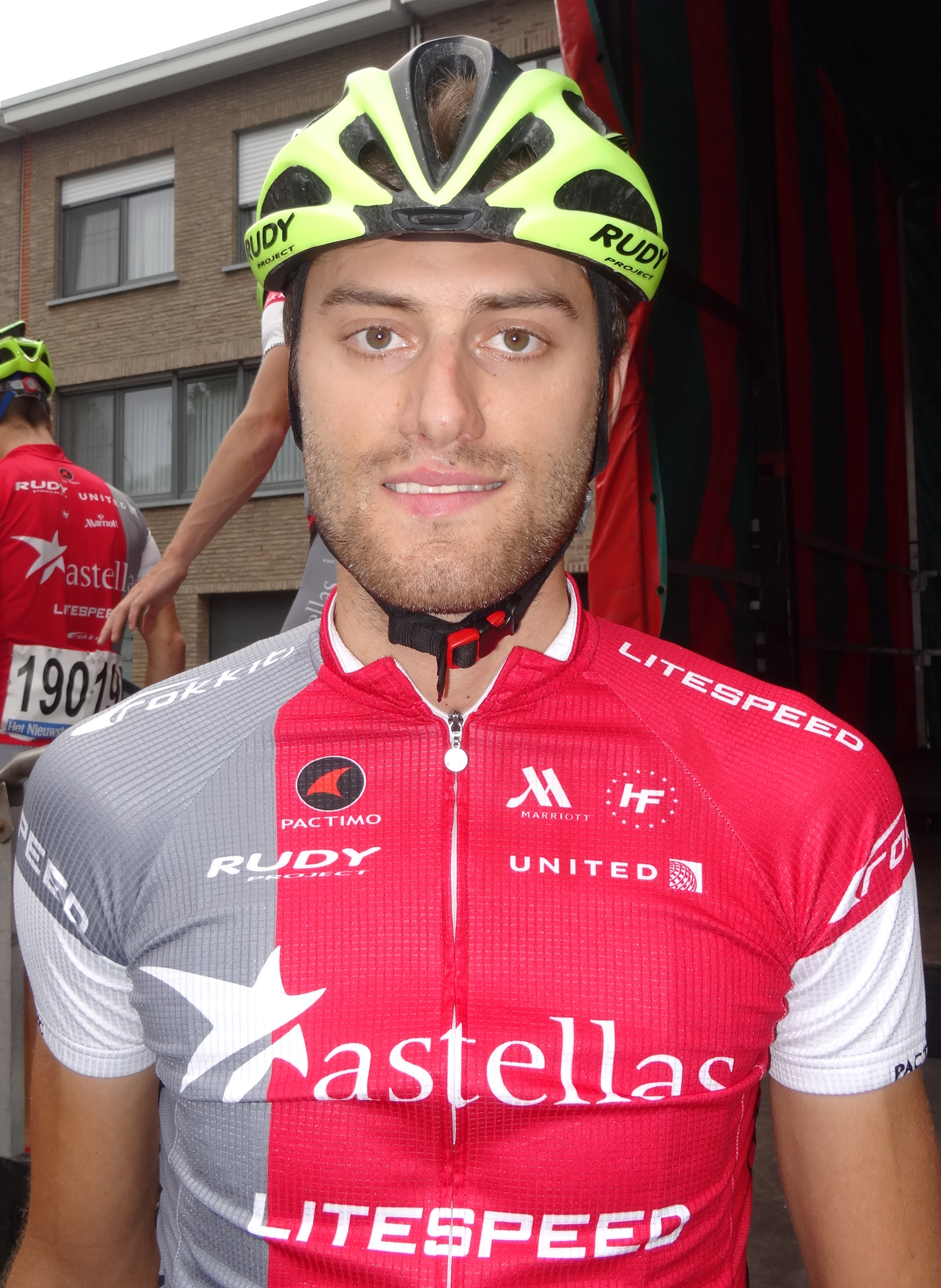 Reportage photographique réalisé le dimanche 10 août à l'occasion du départ et de l'arrivée de la Flèche du port d'Anvers 2014 à Merksem (Anvers), Belgique.